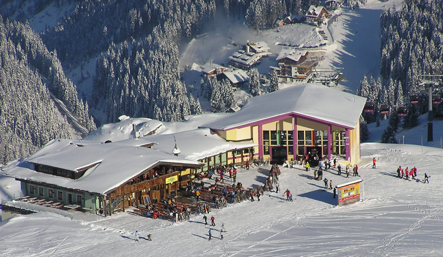 Die Bergstation der 8er-Jet-Gondelbahn im Schigebiet Hochfügen-Hochzillertal